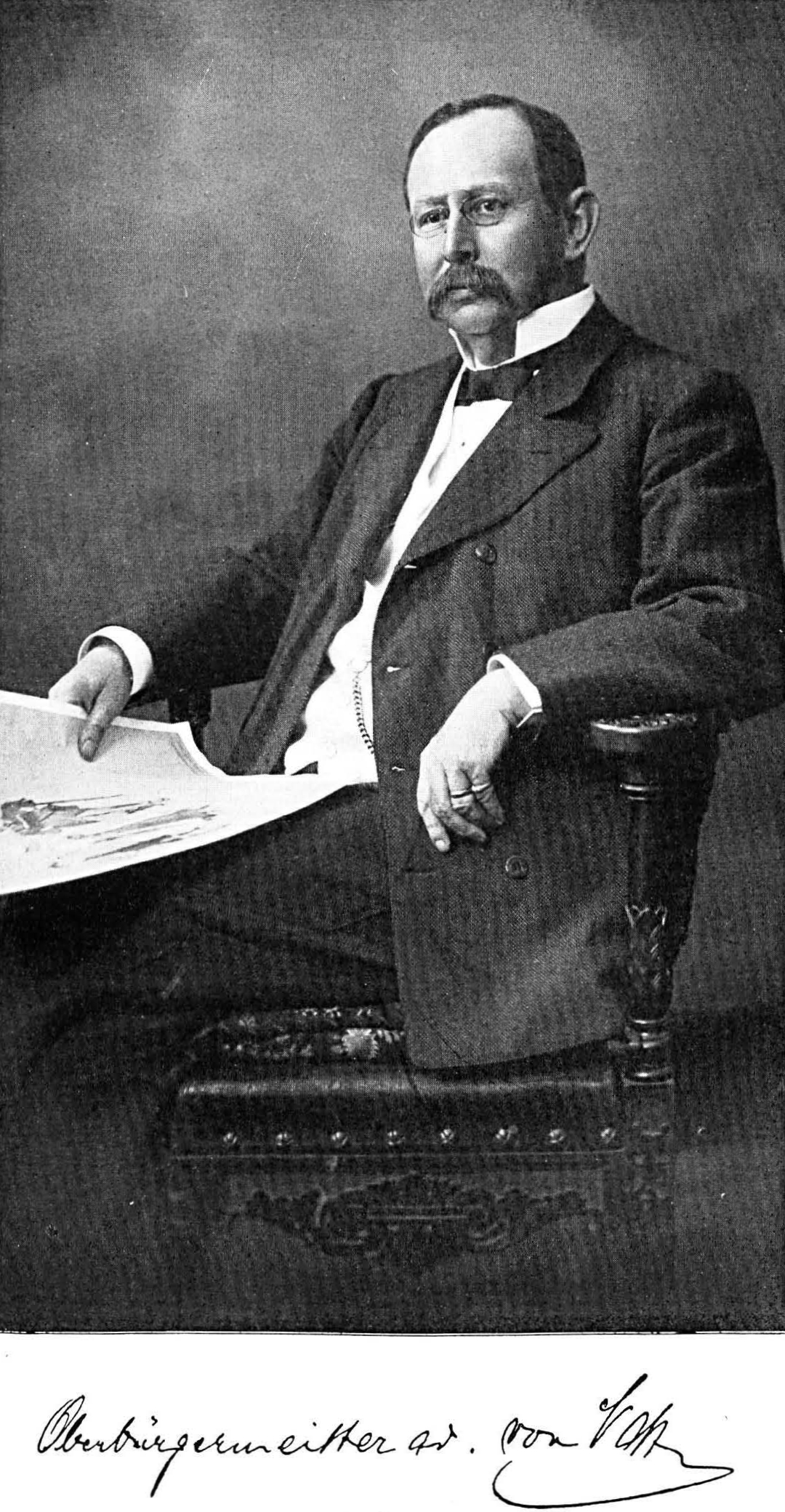 Oskar Nast, Porträt.